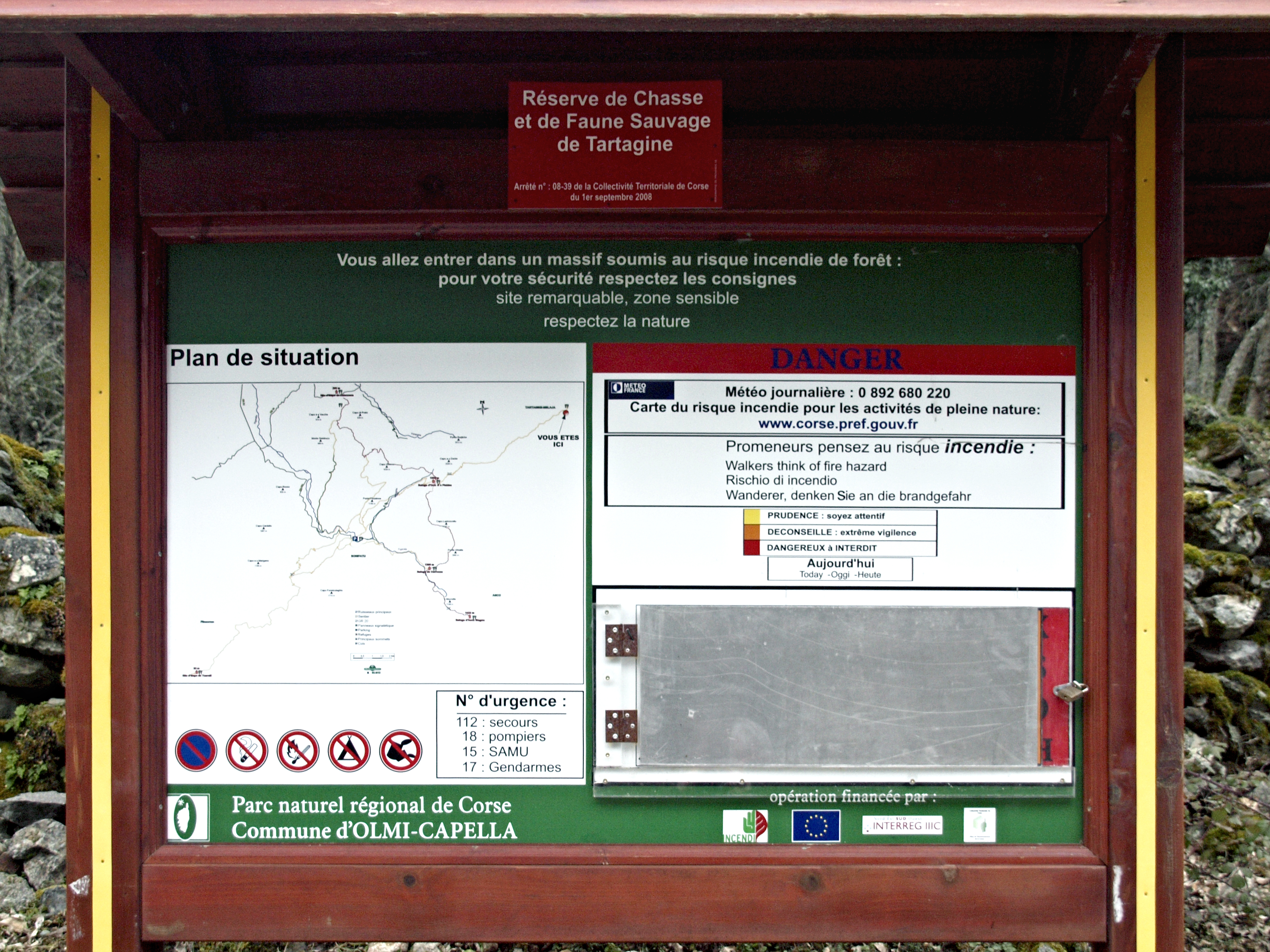 Olmi-Cappella (Corsica) - Panneau d'information du P.N.R.C. à l'entrée de la forêt de Tartagine.